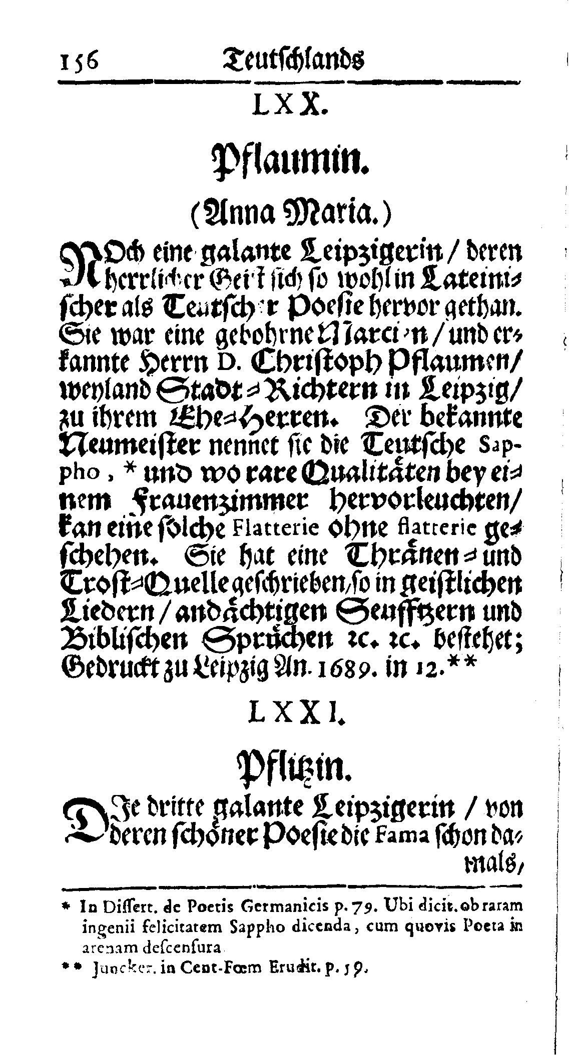 de: Dies ist ein Scan des Buches: en: This is a scan of the book: Teutschlands Galante Poetinnen Mit Ihren sinnreichen und netten Proben; Nebst einem Anhang Ausländischer Dames / So sich gleichfalls durch Schöne Poesien Bey der curieusen Welt bekannt gemacht, und einer Vorrede. Daß das Weibliche Geschlecht so geschickt zum Studieren / als das Männliche / ausgefertiget Von Georg Christian Lehms., Franckfurt am Mayn / Zu finden bey Samuel Tobias Hocker. Gedruckt bey Anton Heinscheidt / Anno 1715. Inhalt: Titel / Widmung Vorrede Teutschlands Galante Poetinnen Anhang Ausländischer Poetinnen